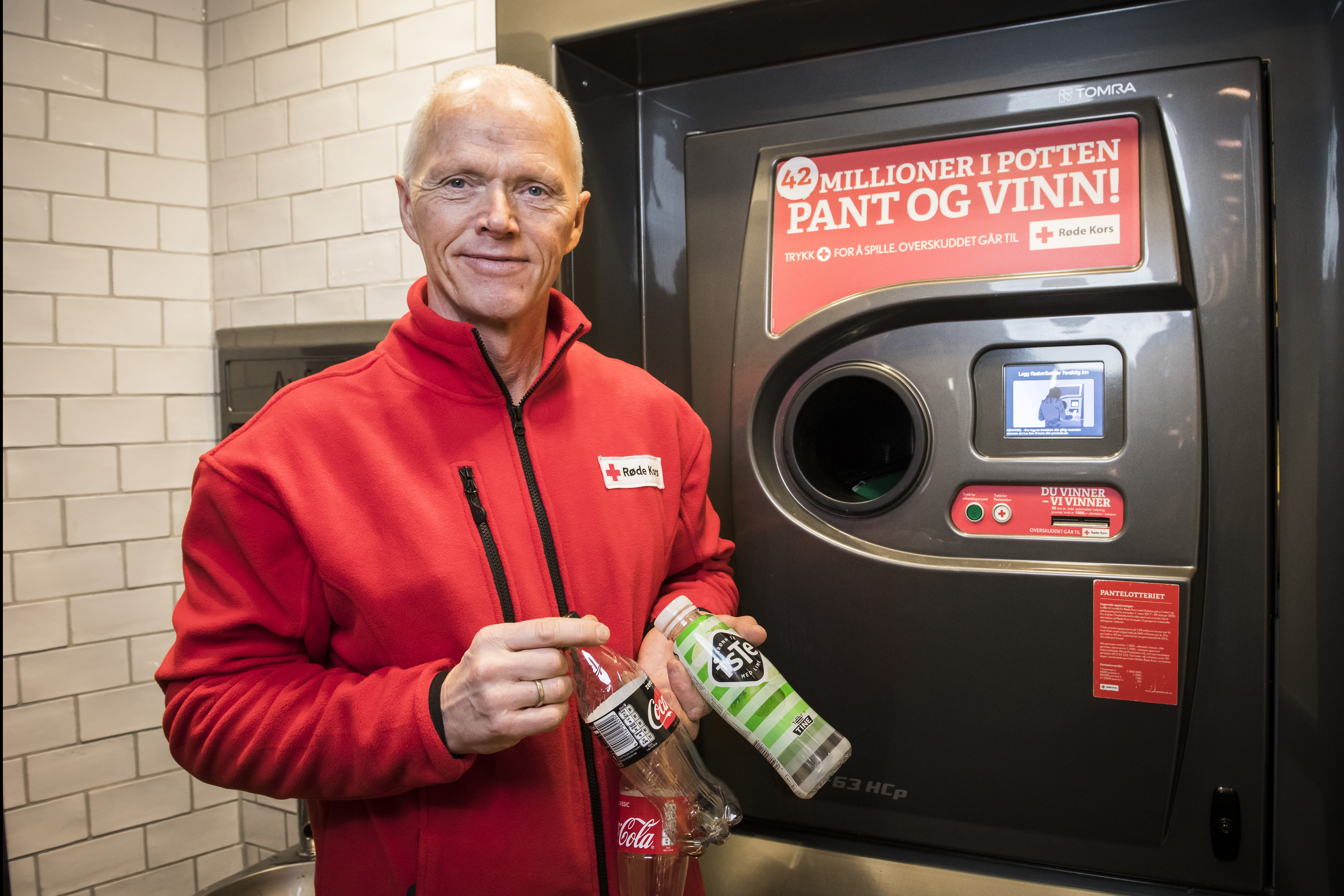 Overskuddet fra Pantelotteriet går til Røde Kors. Avbildet: Robert Mood, president i Røde Kors Norge.